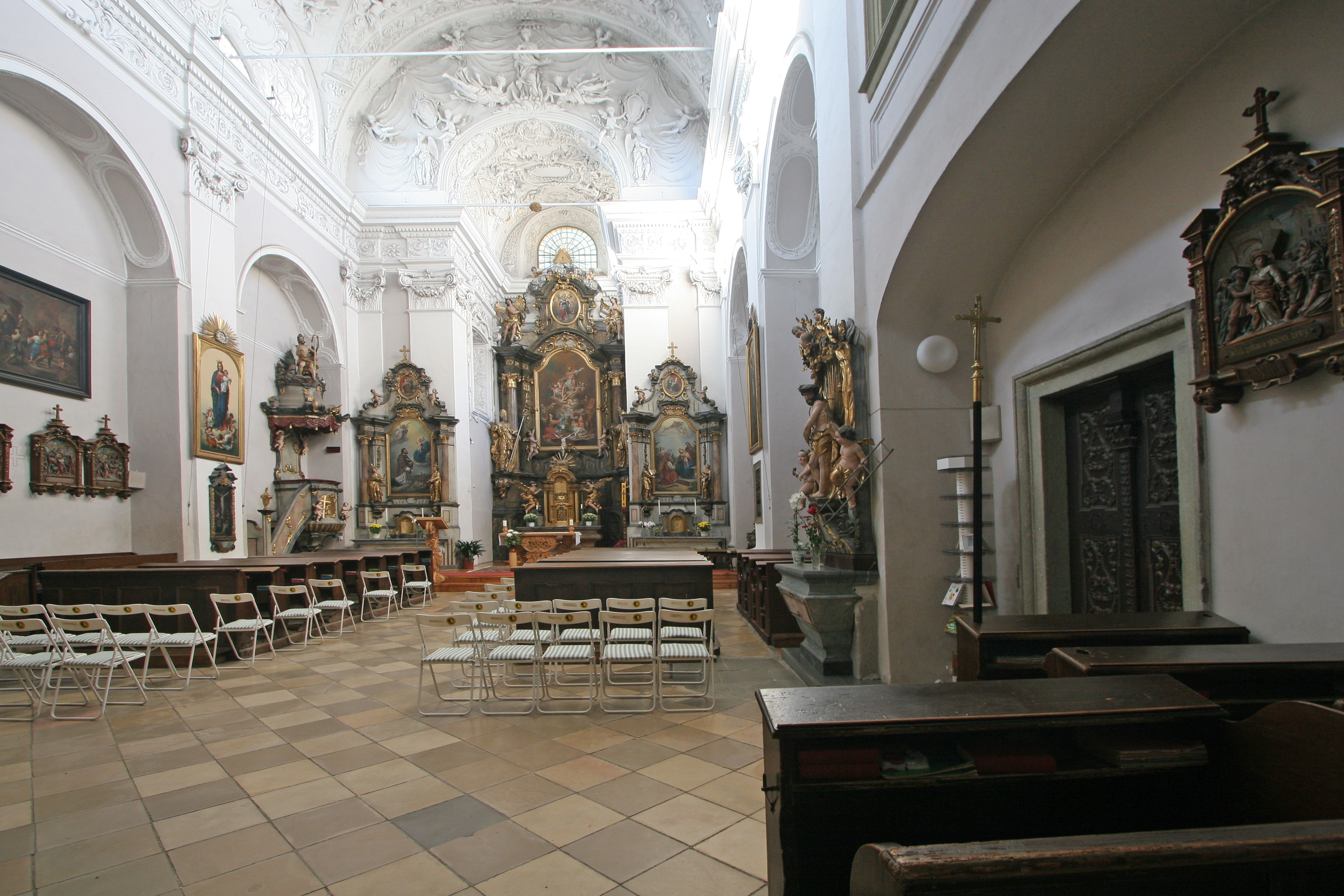 Kostel sv. Václava (Letohrad), Václavské náměstí, Letohrad